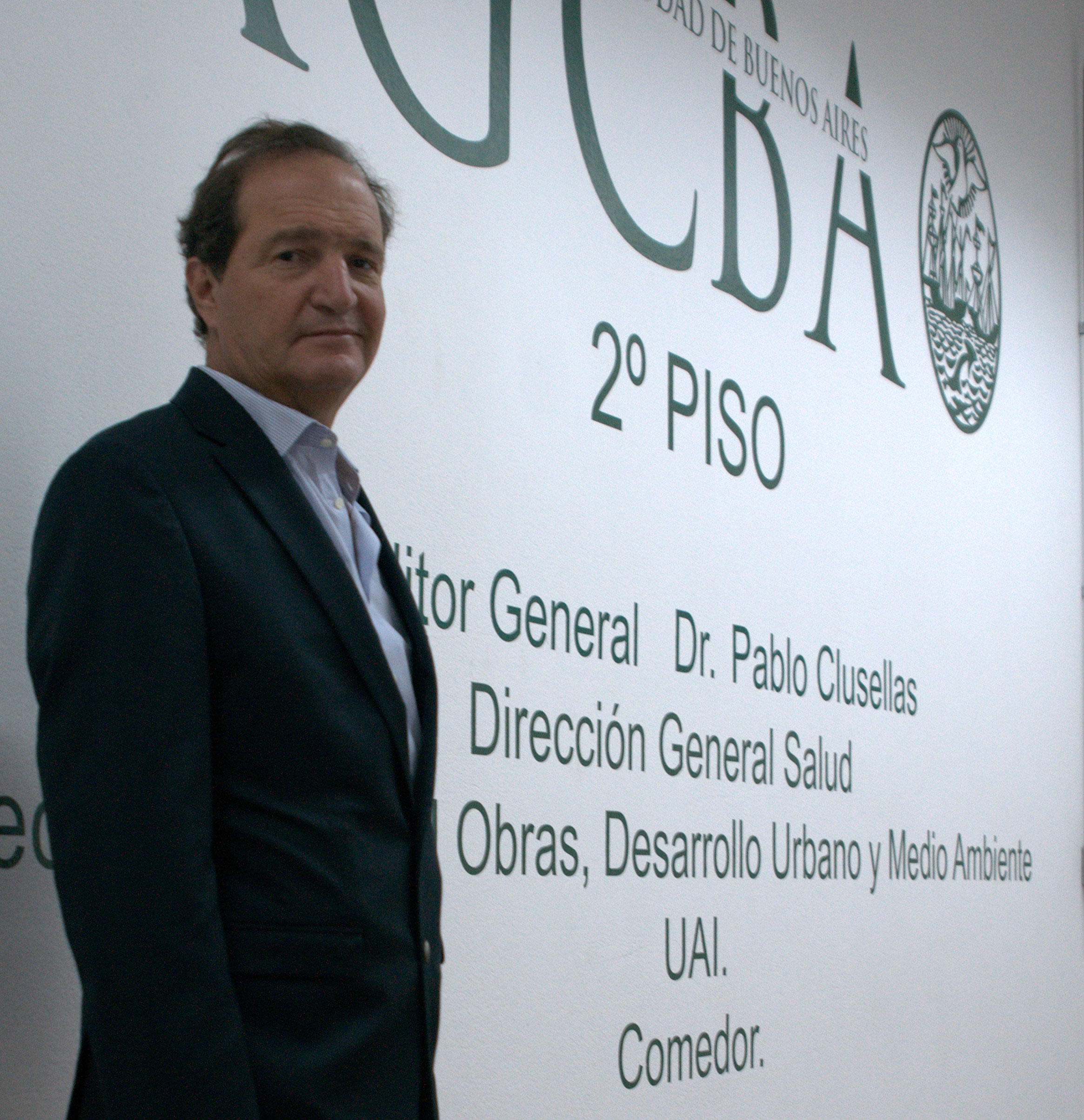 El Abogado Pablo Clusellas ingresando en la Auditoría General de la Ciudad de Buenos Aires